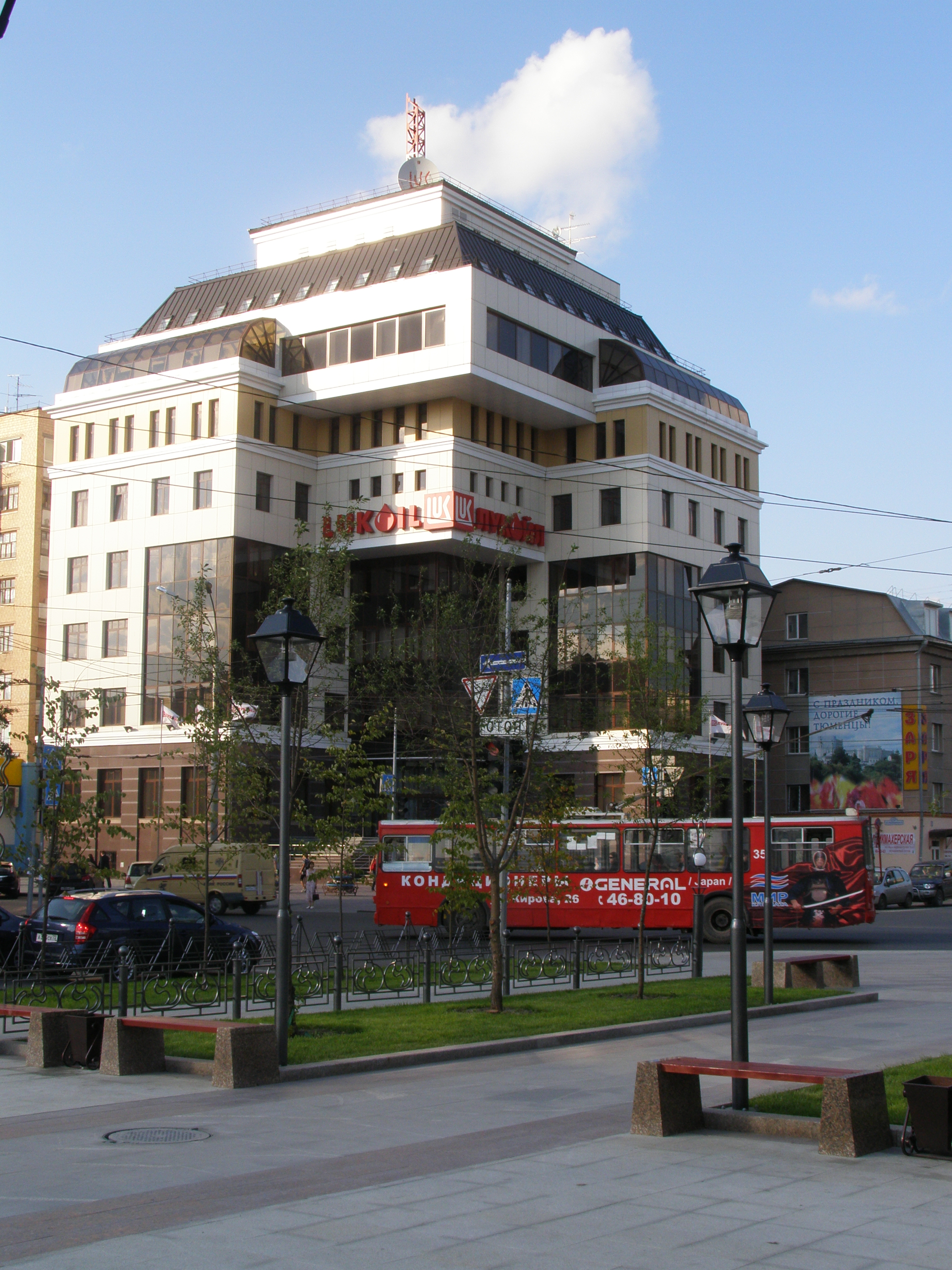 Oficejo de "Lukoil Okcidenta Siberio". Tjumeno, Rusio.